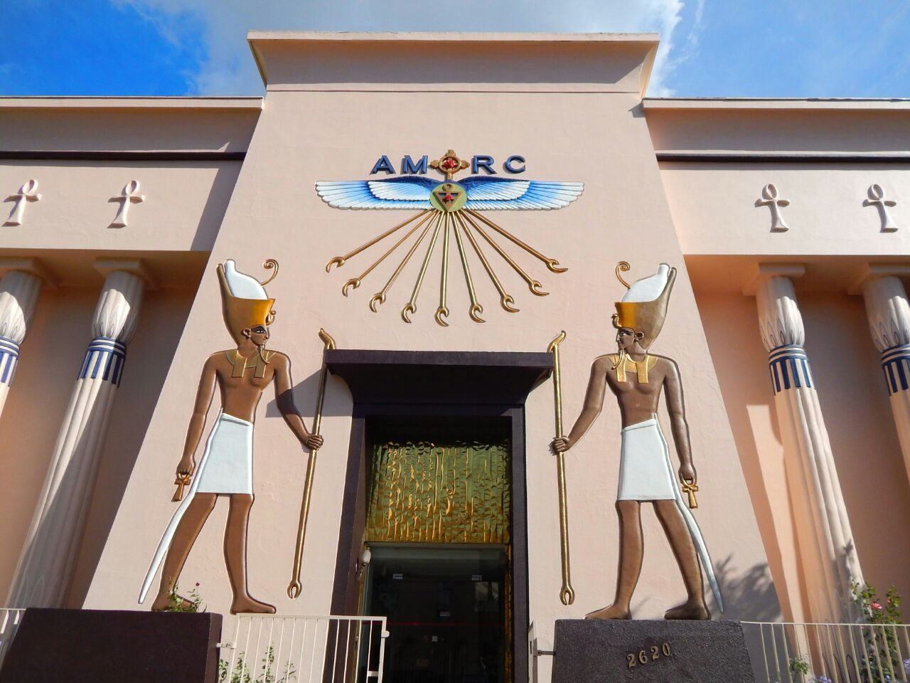 Museu Egípcio e RosaCruz, em Curitiba. fonte: Evelim Lamaiara